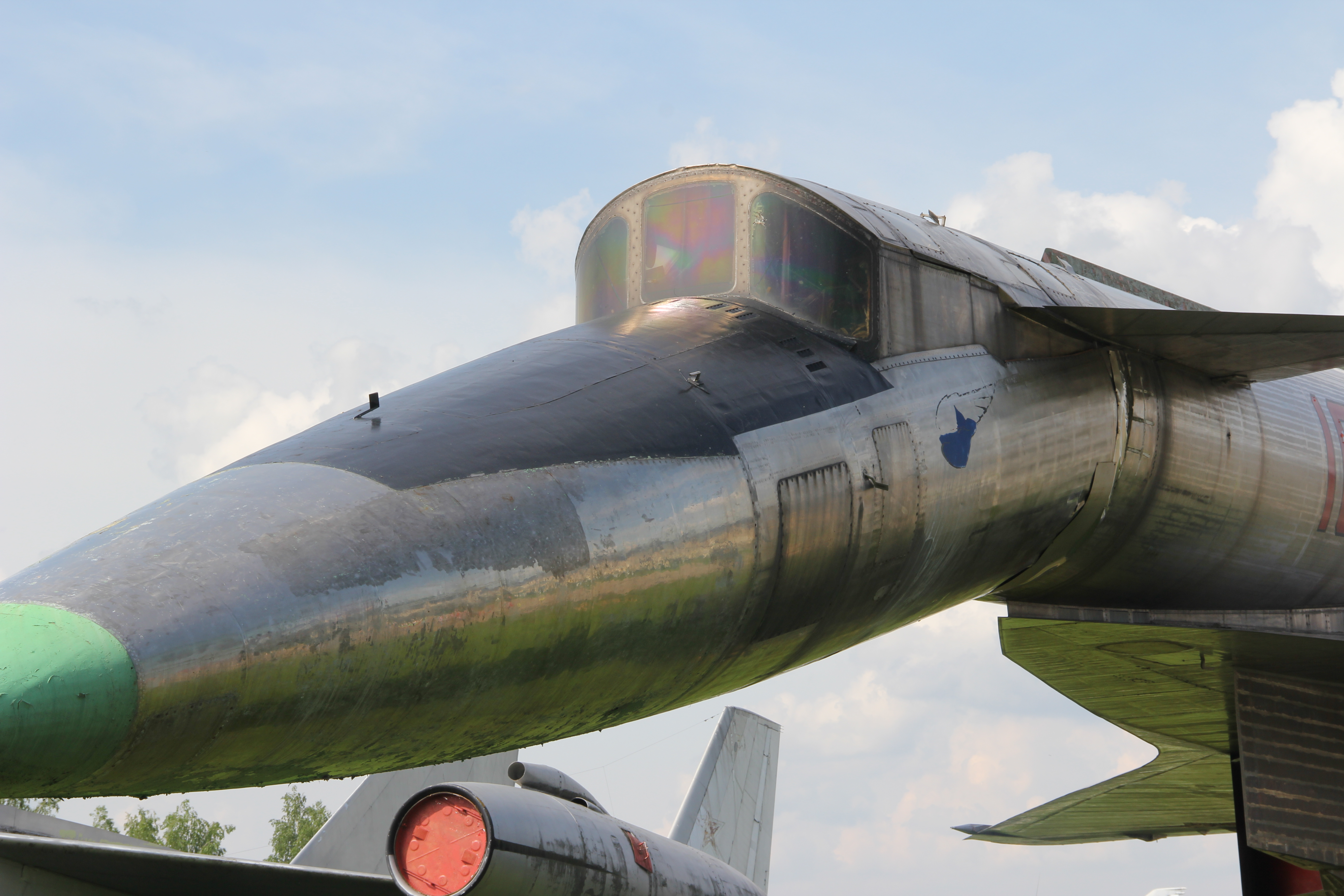 Sukhoi T-4